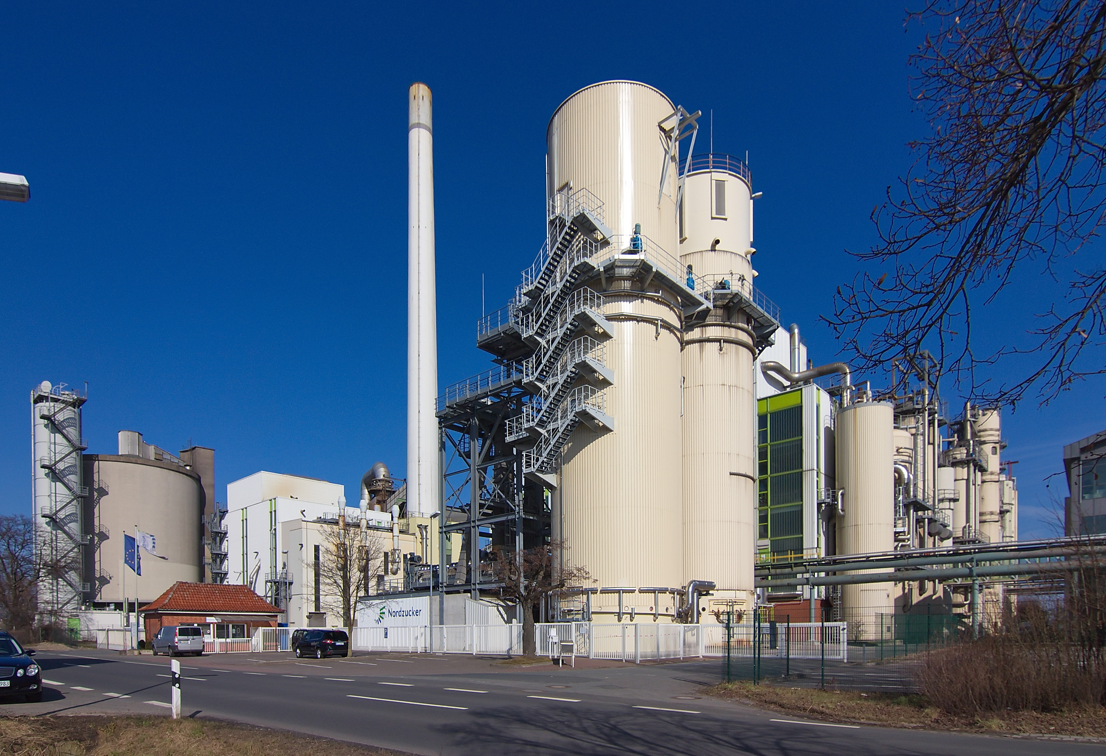 Zuckerfabrik der Nordzucker AG in Clauen (Hohenhameln), Niedersachsen, Deutschland